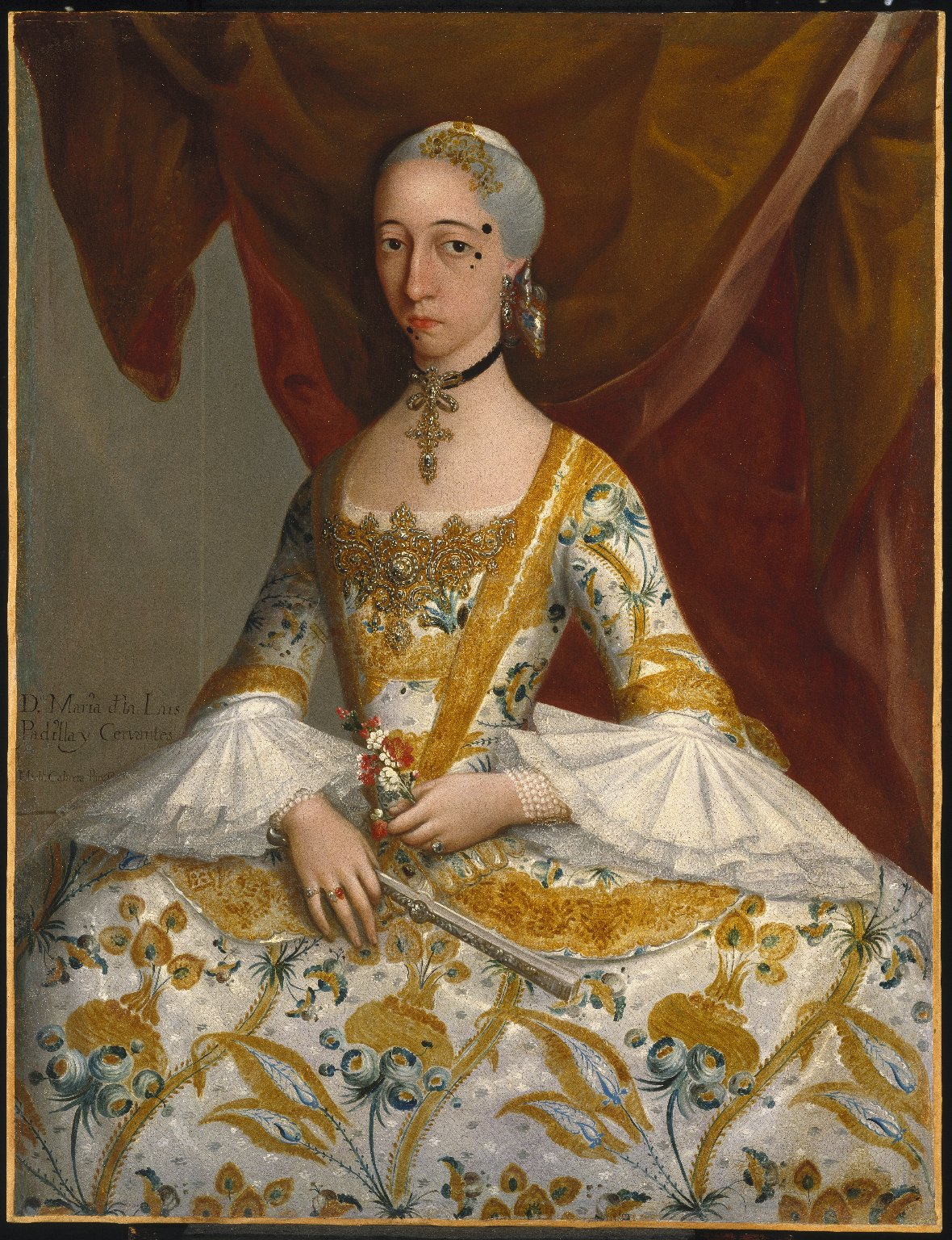 Retrato de María de la Luz Padilla y Gómez de Cervantes.